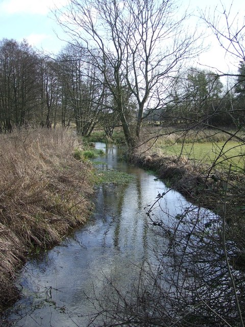 River Gadder, Cockley Cley, Norfolk